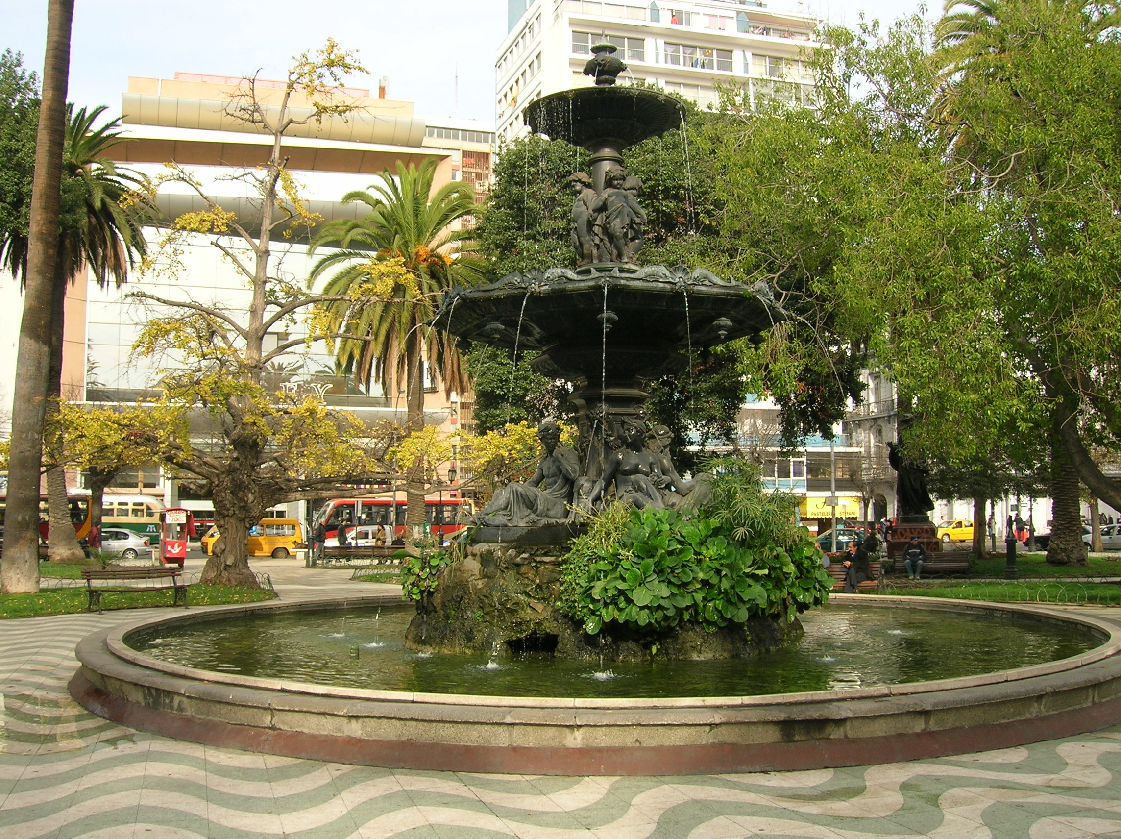 Fuente de la Plaza Victoria, Valparaíso